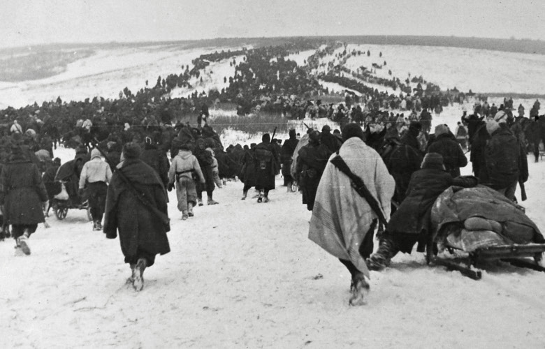 L'enorme colonna di soldati in rotta dopo lo sfondamento sovietico sul Don